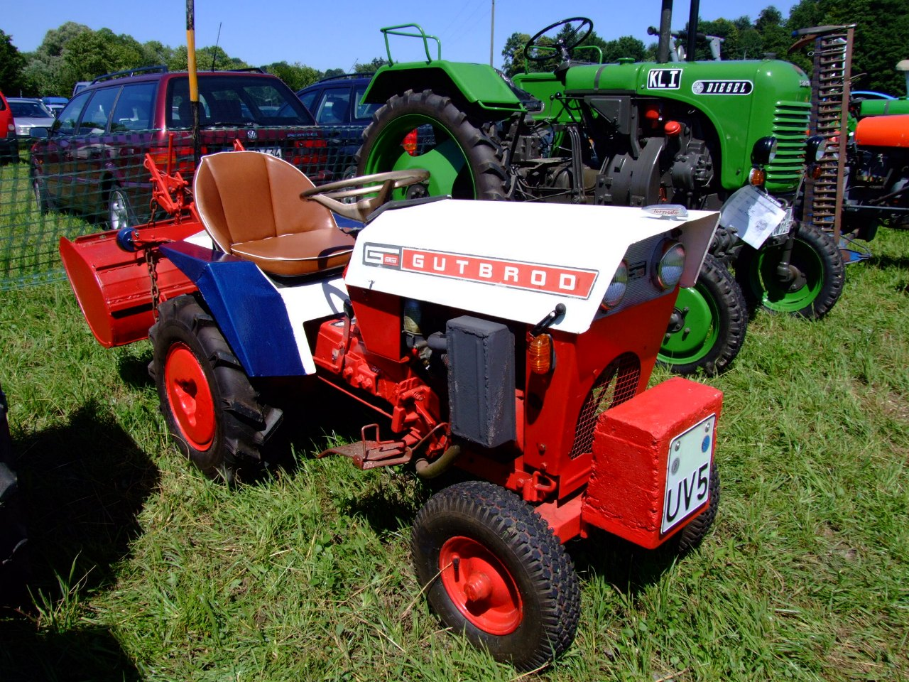 Gutbrod-Kleintraktor 1031 (12 PS, Baujahr 1967, Eigengewicht 450 kg, zul. Gesamtgewicht 600 kg, zul. Achsdruck vorne 250 kg, zul. Achsdruck hinten 360 kg) mit Fräse im Heck; Steyr-Traktor dahinter (rechts)